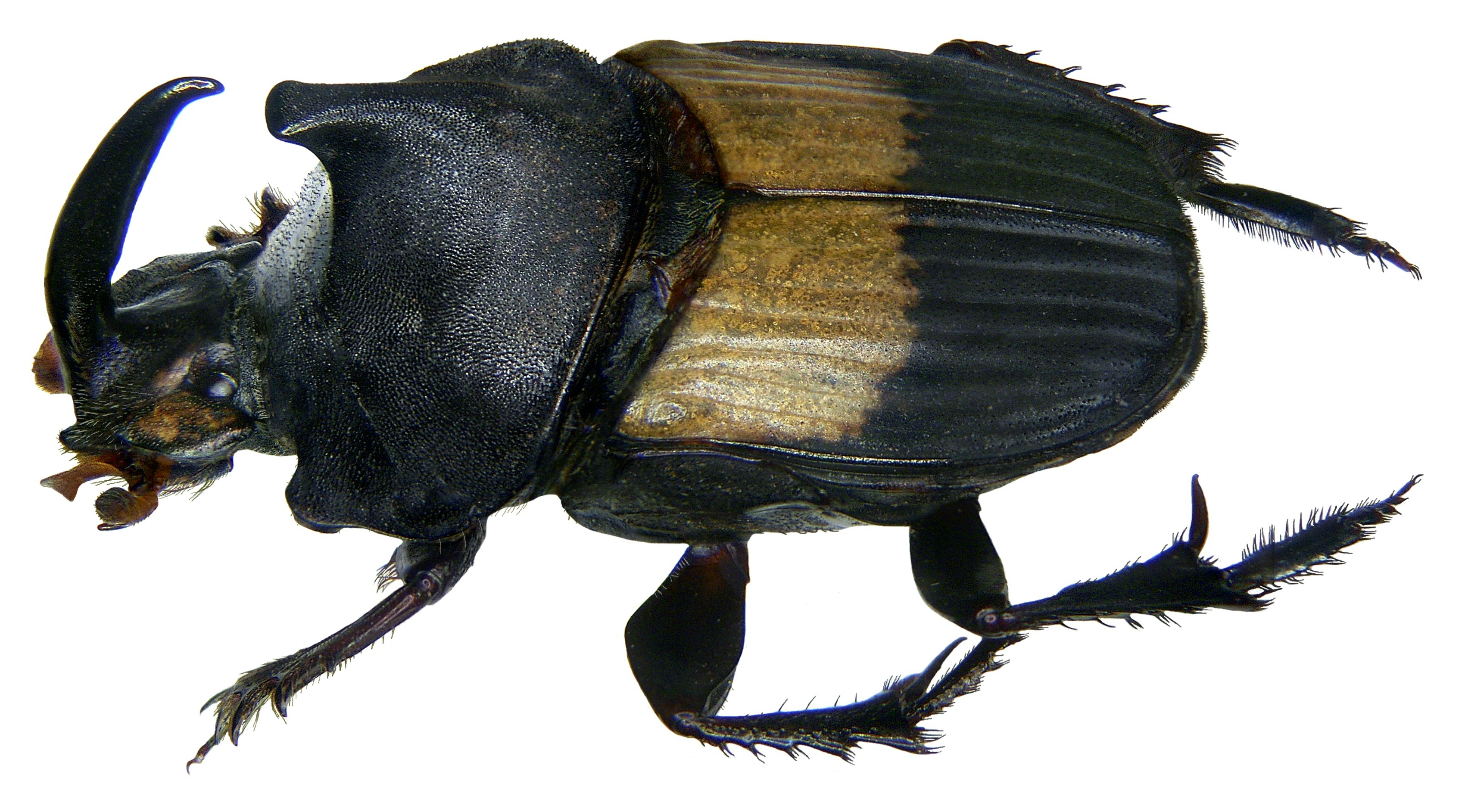 Familie: Scarabaeidae Größe: 18-19 mm Verbreitung: Namibia Fundort: Namibia,Outjo leg.det. U.Schmidt, 1994 Foto: U.Schmidt, 2008